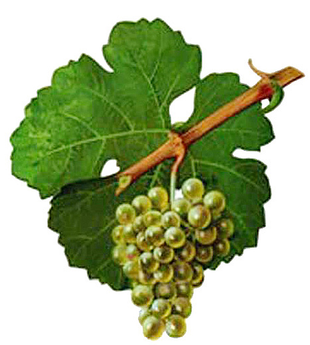 Grappe de Sylvaner par Viala et Vermorel